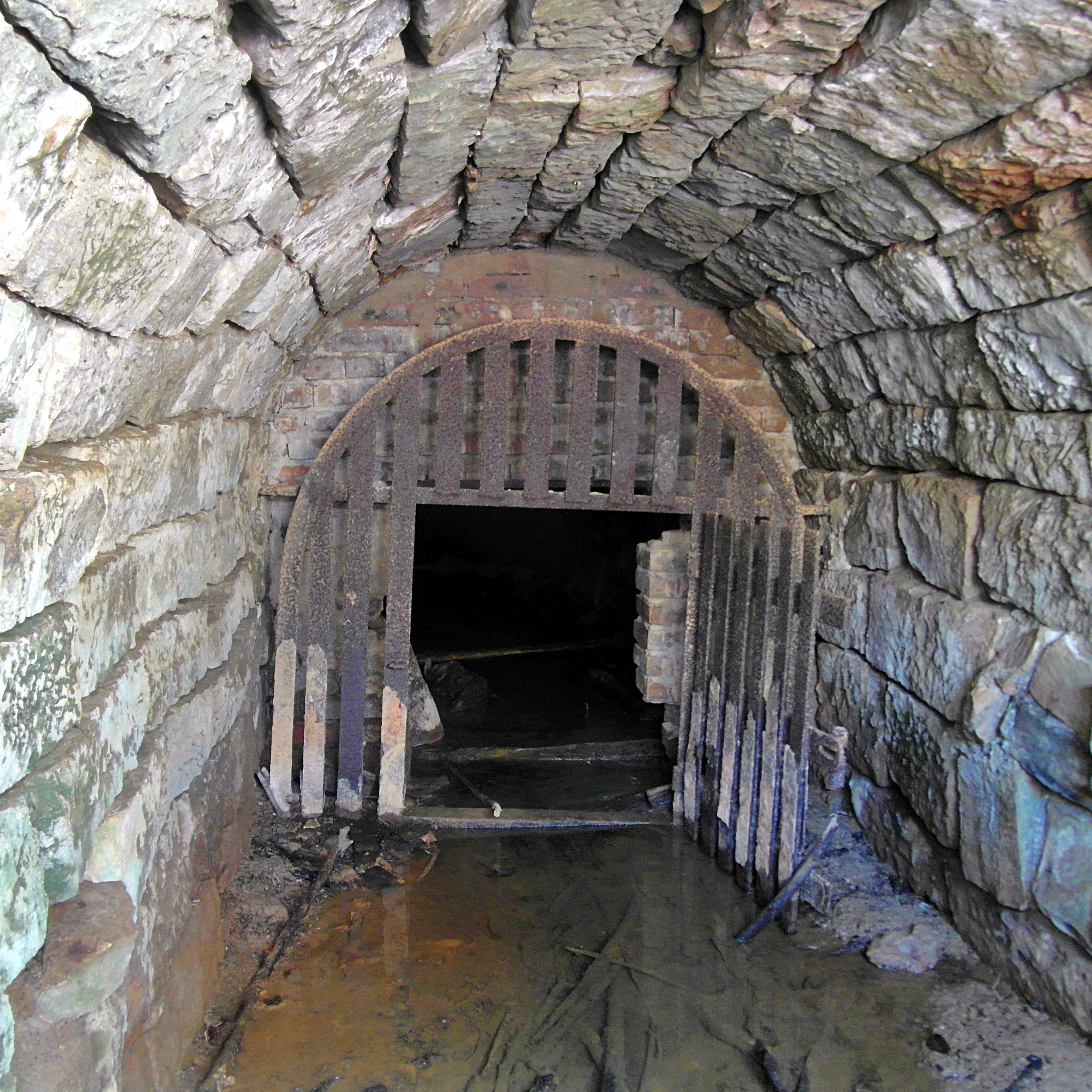 Im König-Wilhelm-Stollen wurde Steinkohle gefördert. Wird zur Unterscheidung vom benachbarten gleichnamigen Vorgänger oft Eisenbahnerstollen genannt. Der Stollen stellt ein in Niedersachsen nach Anzahl und Artenvielfalt einmaliges Quartier der vom Aussterben bedrohten streng geschützten Fledermäuse dar. (Naturdenkmal ND-H 157)